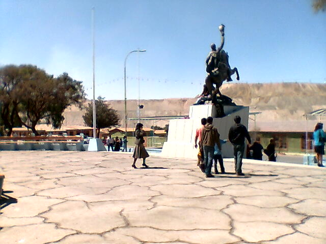 Xhuquicamat el dia de su despedida